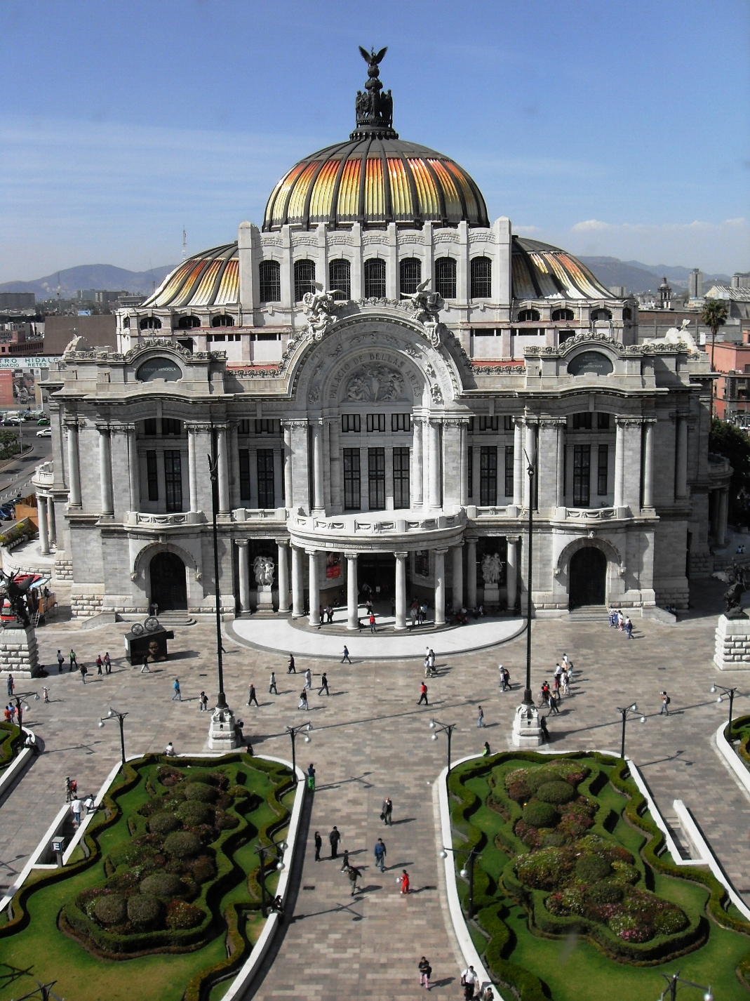 Opera house in Mexico city